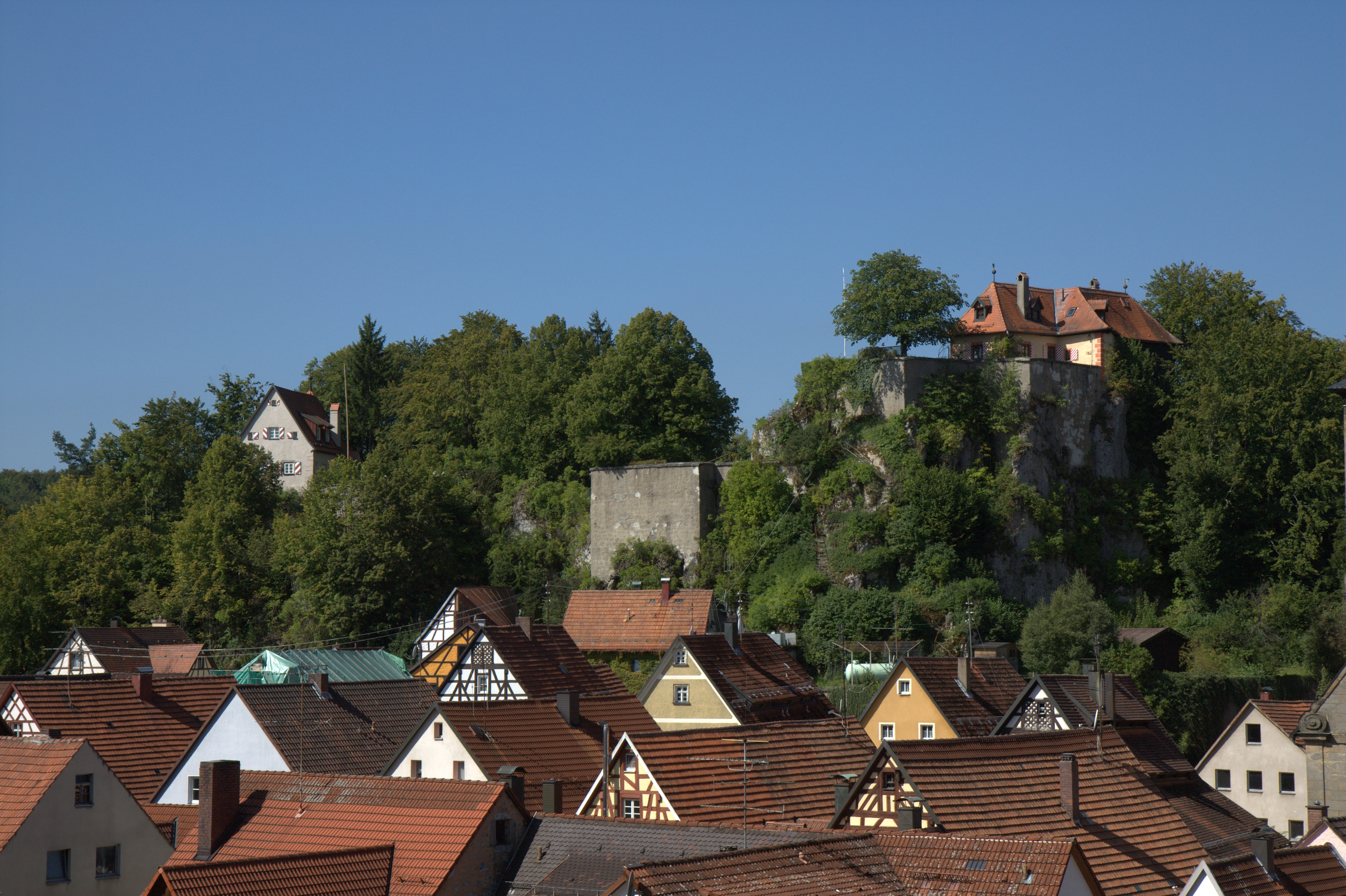 Burg Betzenstein - Ansicht der Burganlage von Osten